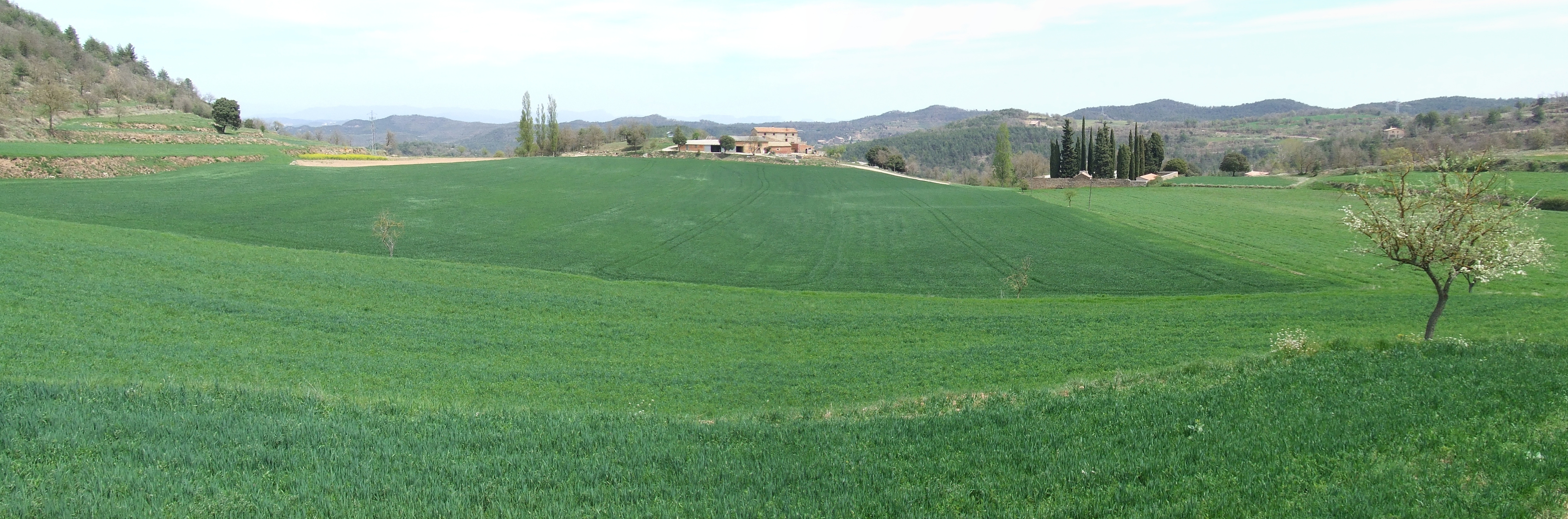 El Pla de la Crossa (l'Estany, Moianès)